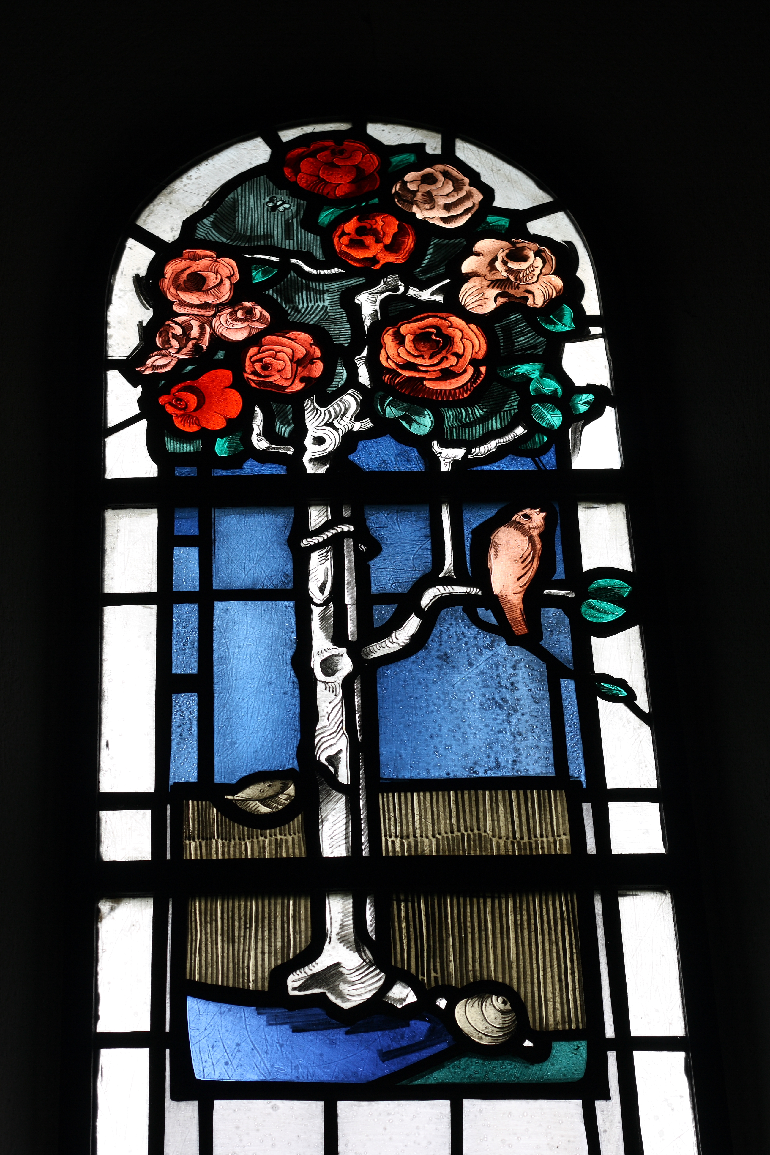 Bleiglasfenster in der katholischen Pfarrkirche St. Michael in Großbüllesheim, Darstellung: Rosen